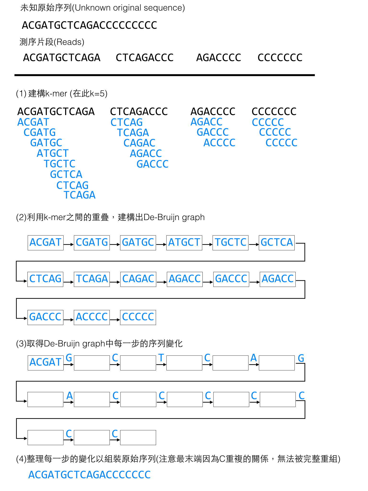 DBG法序列組裝示意圖